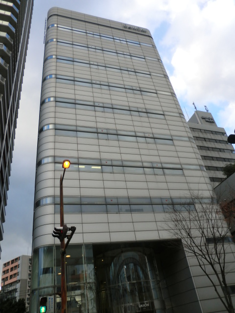 北九州市の第一交通産業の本社です。